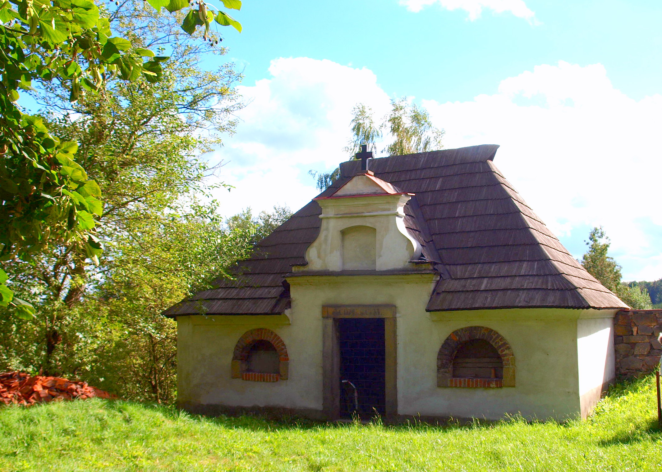 Brniště kostel